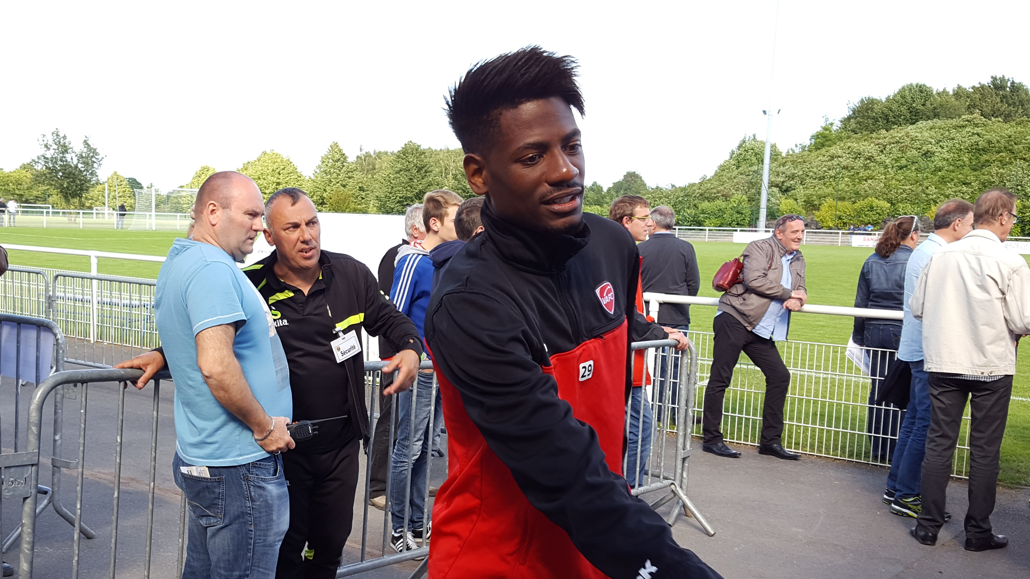 Nuno da Costa avant le match amical Valenciennes / UNFP FC, le 2 juillet 2016, au Stade des Navarres à Aniche.